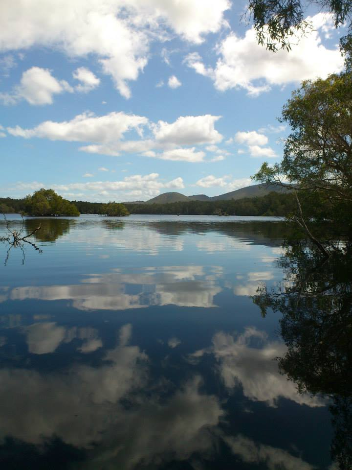 Vue sur le Marais Temrock au Domaine de Déva